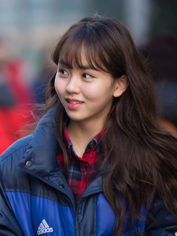 15.01.24 음악중심 김소현 퇴근길